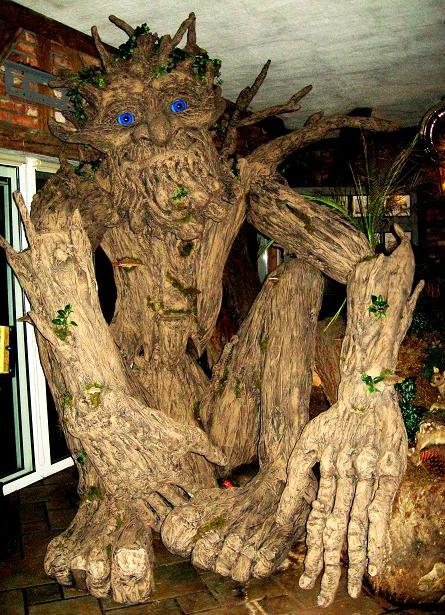 Drzewiec wykonany przez pracownię artystyczną Mazagro-Art w technice papier-mâché ,miejsce instalacji Canpol Odejewski Człuchów.